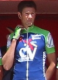 Comunidad Valenciana, Euskal Bizikleta 2005 David Latasa